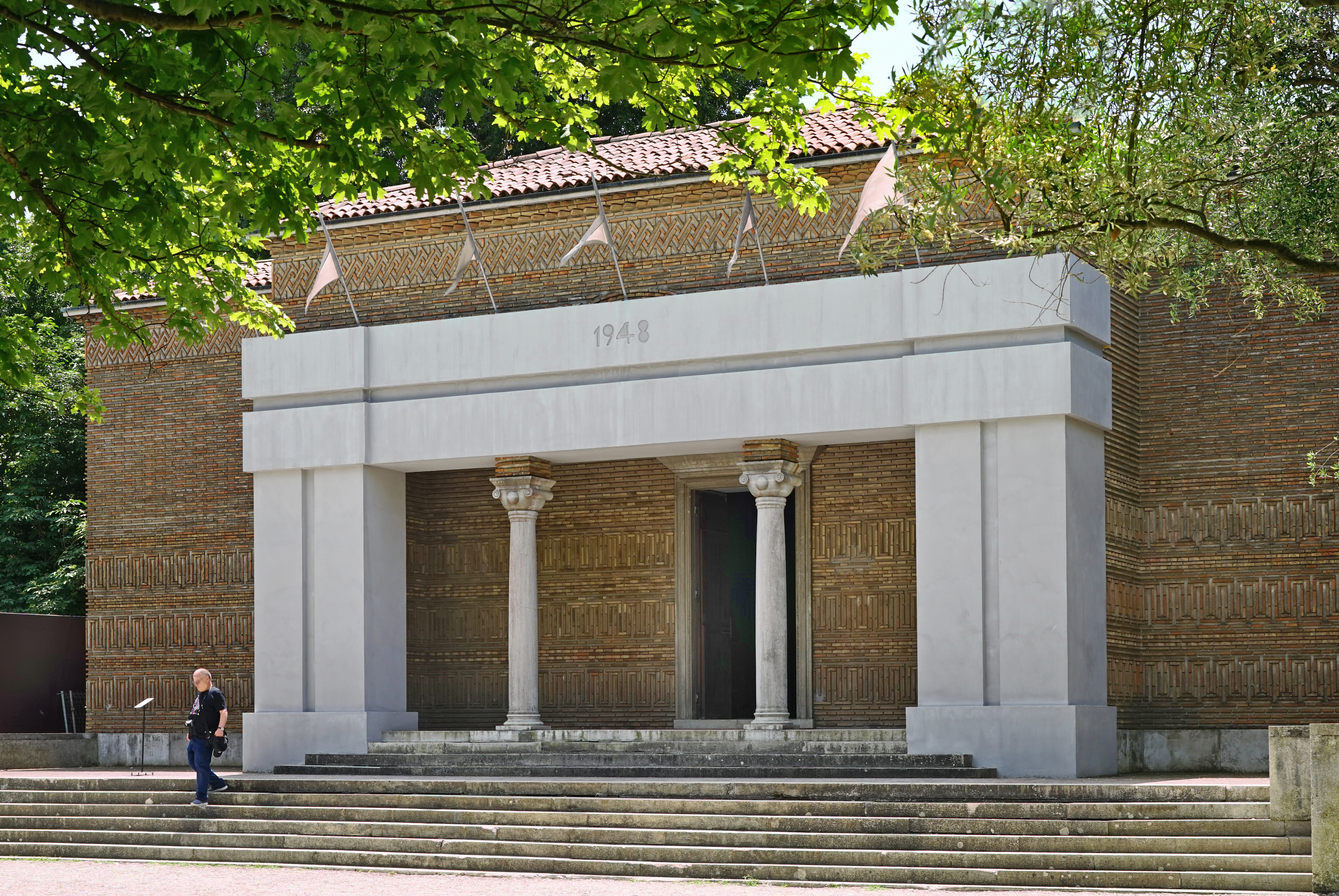 The Concession Reconstruction de la porte du camp de rétention et de réhabilitation de l'île de Makronisos en Grèce (camp créé par les anglais en 1946 durant la guerre civile pour emprisonner les opposants de gauche), installation sur la façade du pavillon grec Oeuvre de Zafos Xagoraris (avec la collaboration de Katerina Stefanidaki pour le système d'accrochage) Biennale d'art de Venise 2019 Le pavillon grec a été conçu par l'architecte Papandréou en 1933 dans les jardins de la Biennale de Venise. La façade d'origine est en briques, elle comprend un portique avec trois ouvertures séparées par deux colonnes de marbre, le portique est caché par la porte de Makronissos. Le pavillon de la Grèce sur le site officiel de la Biennale 2019